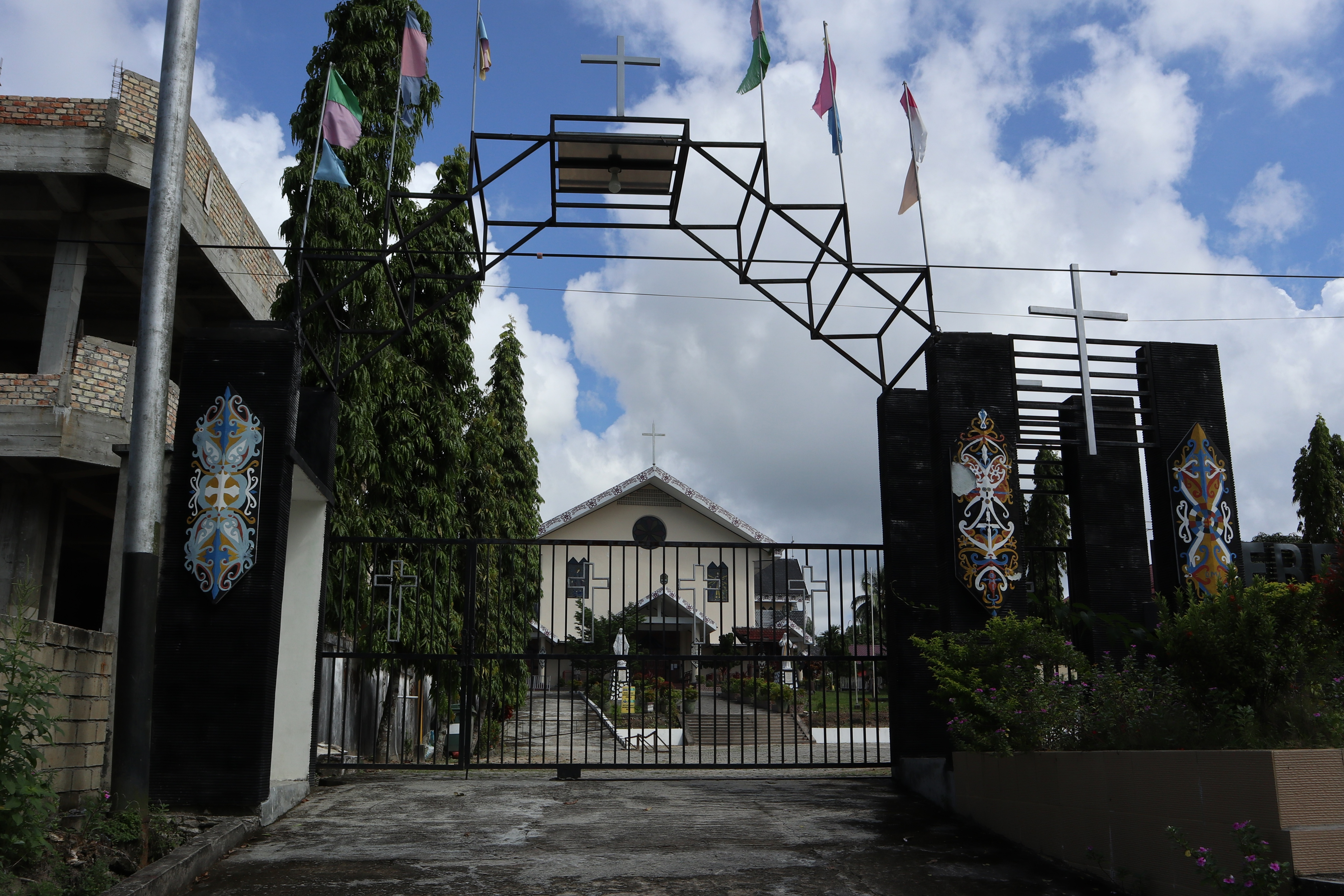 Paroki Santa Maria Imakulata Tarakan.